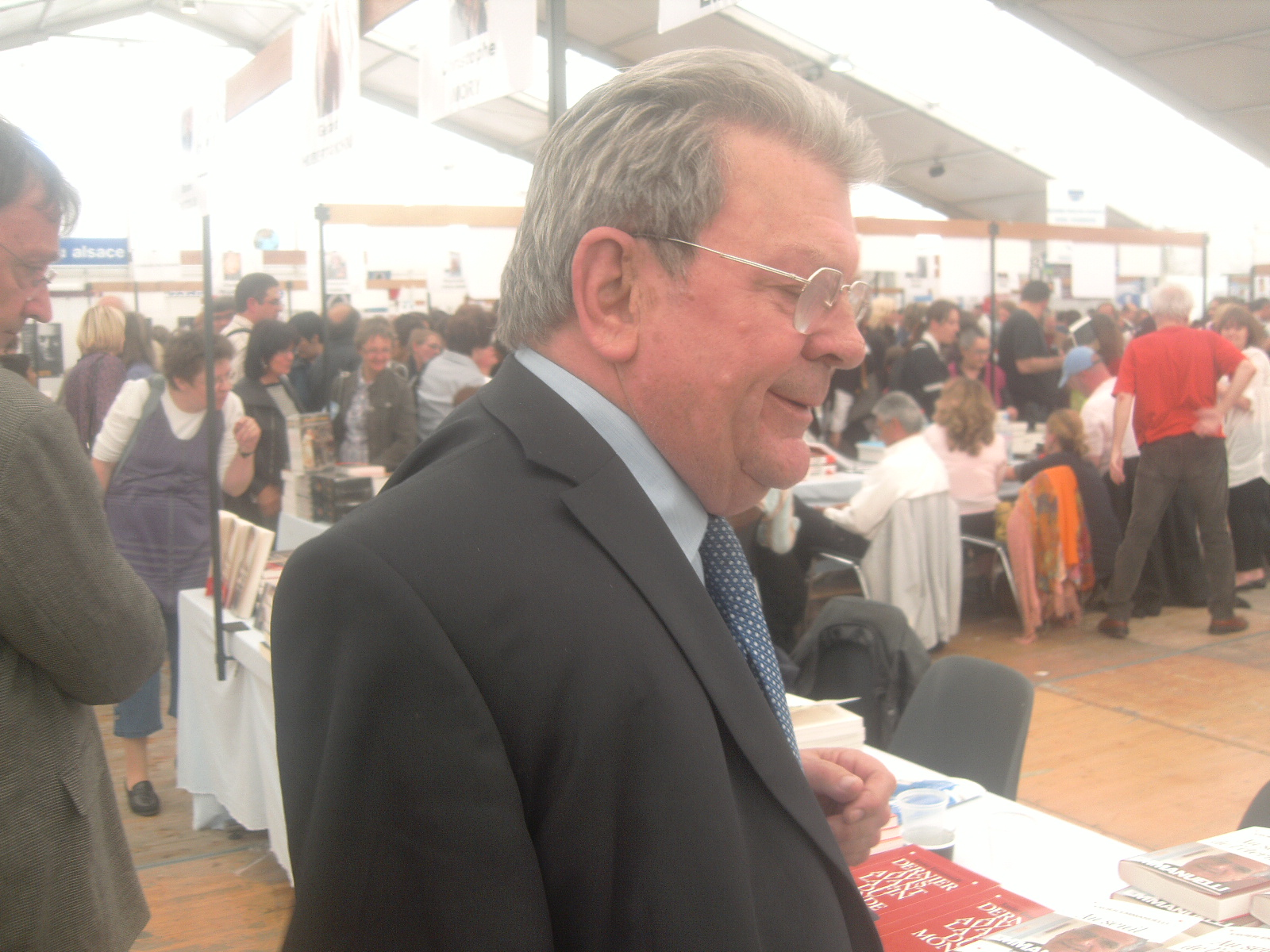 Jean Ueberschlag à la 27ème Foire du Livre de Saint-Louis le 8 mai 2010